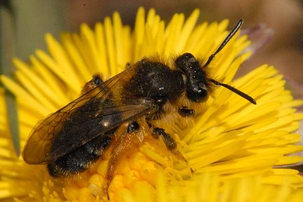 Andrena carantonica ( = Andrena sabulosa) from Commanster, Belgian High Ardennes .